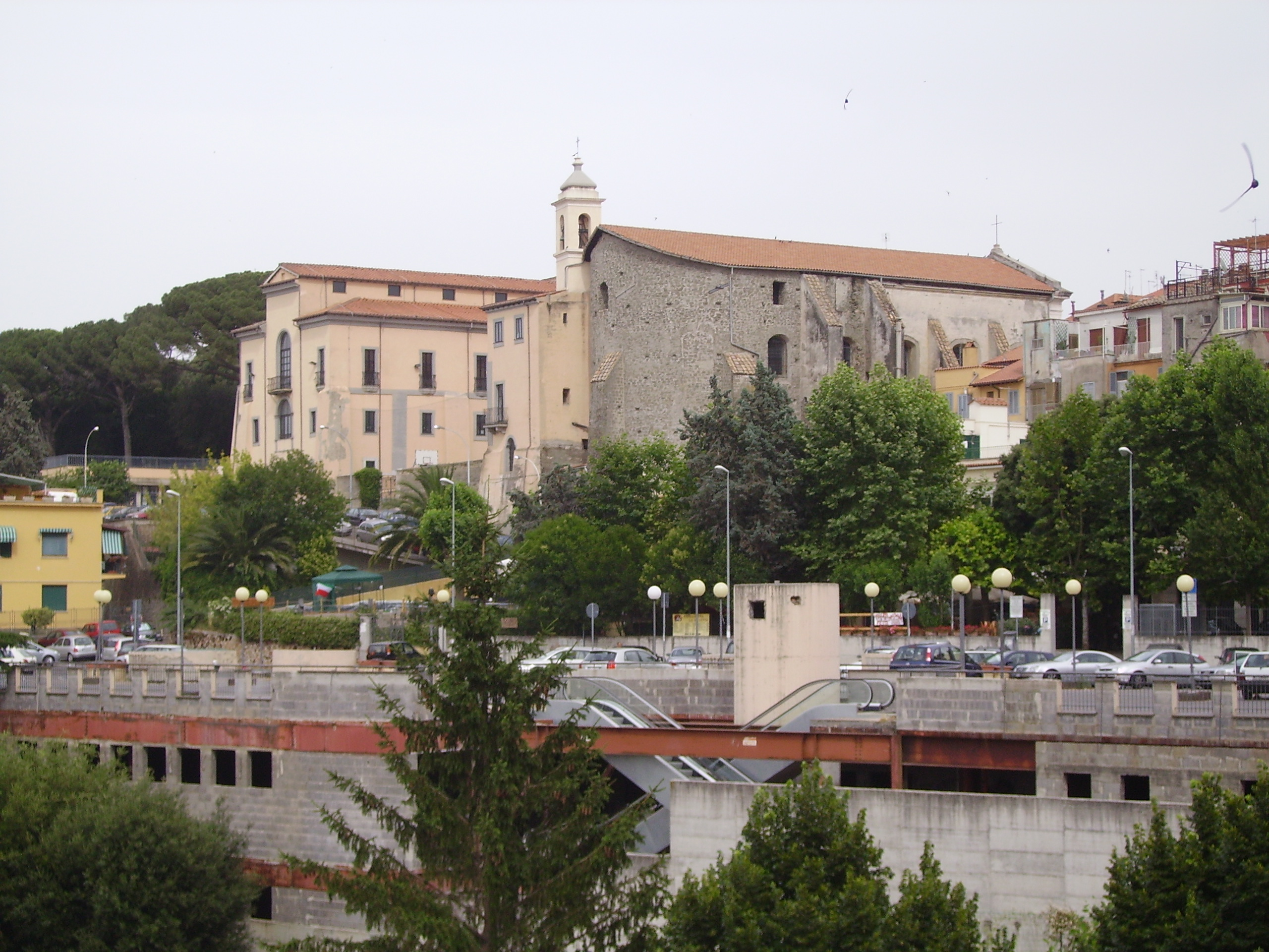 Abside SS.Trinità lato - Marino